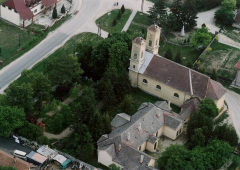 Polgárdi, Hungary, aerialphotography